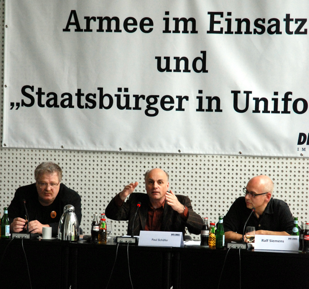 Jürgen Rose (Darmstädter Signal), Paul Schäfer (DIE LINKE) und Ralf Siemens (asfrab) beim Fachgespräch "Armee im Einsatz und "Staatsbürger in Uniform""